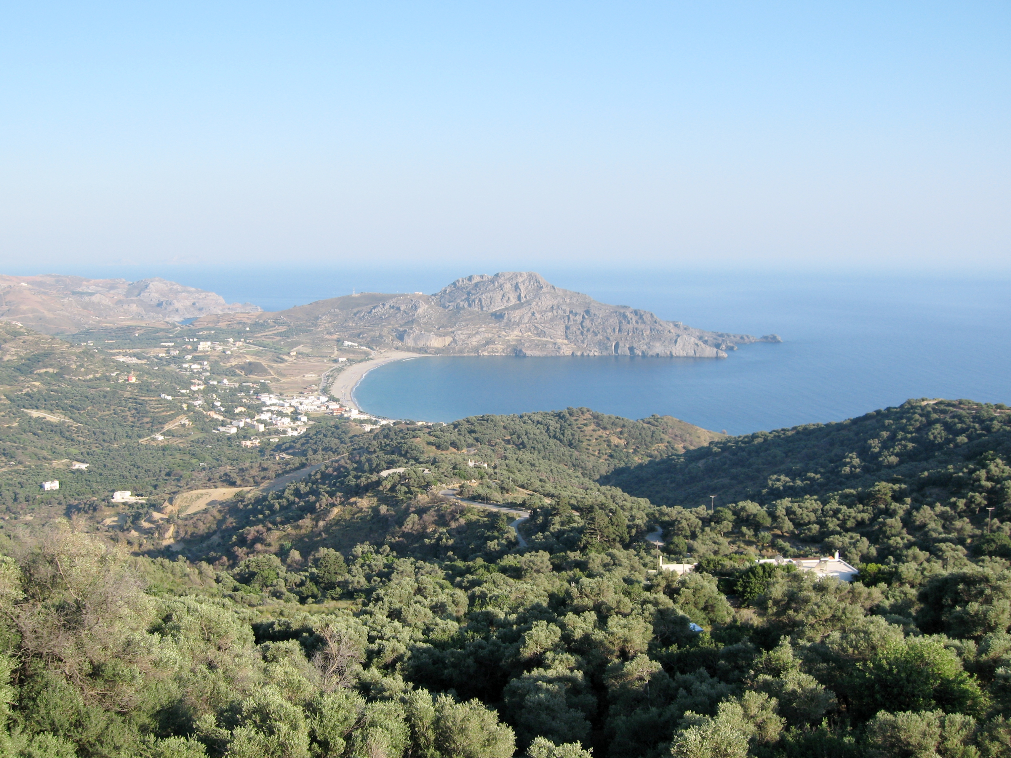 Bucht von Plakias, Gemeinde Agios Vasilios, Regionalbezirk Rethymno, Kreta, Griechenland